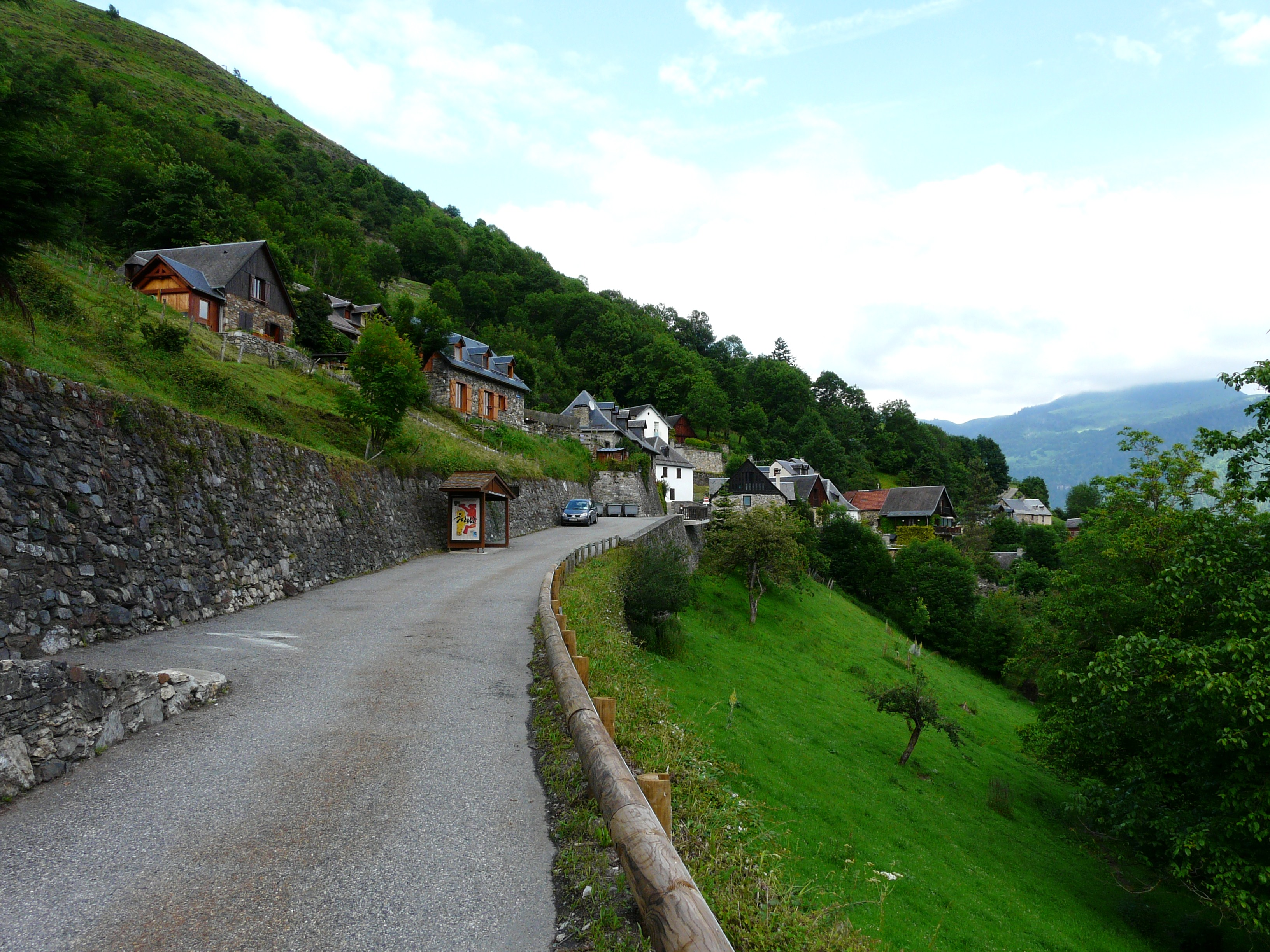 Le village de Cazaril-Laspènes vu depuis l'ouest, Haute-Garonne, France.